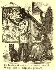 19e eeuwse afbeelding van een liedzanger / straatzanger. Hij wijst naar een roldoek. De vrouw speelt harp.